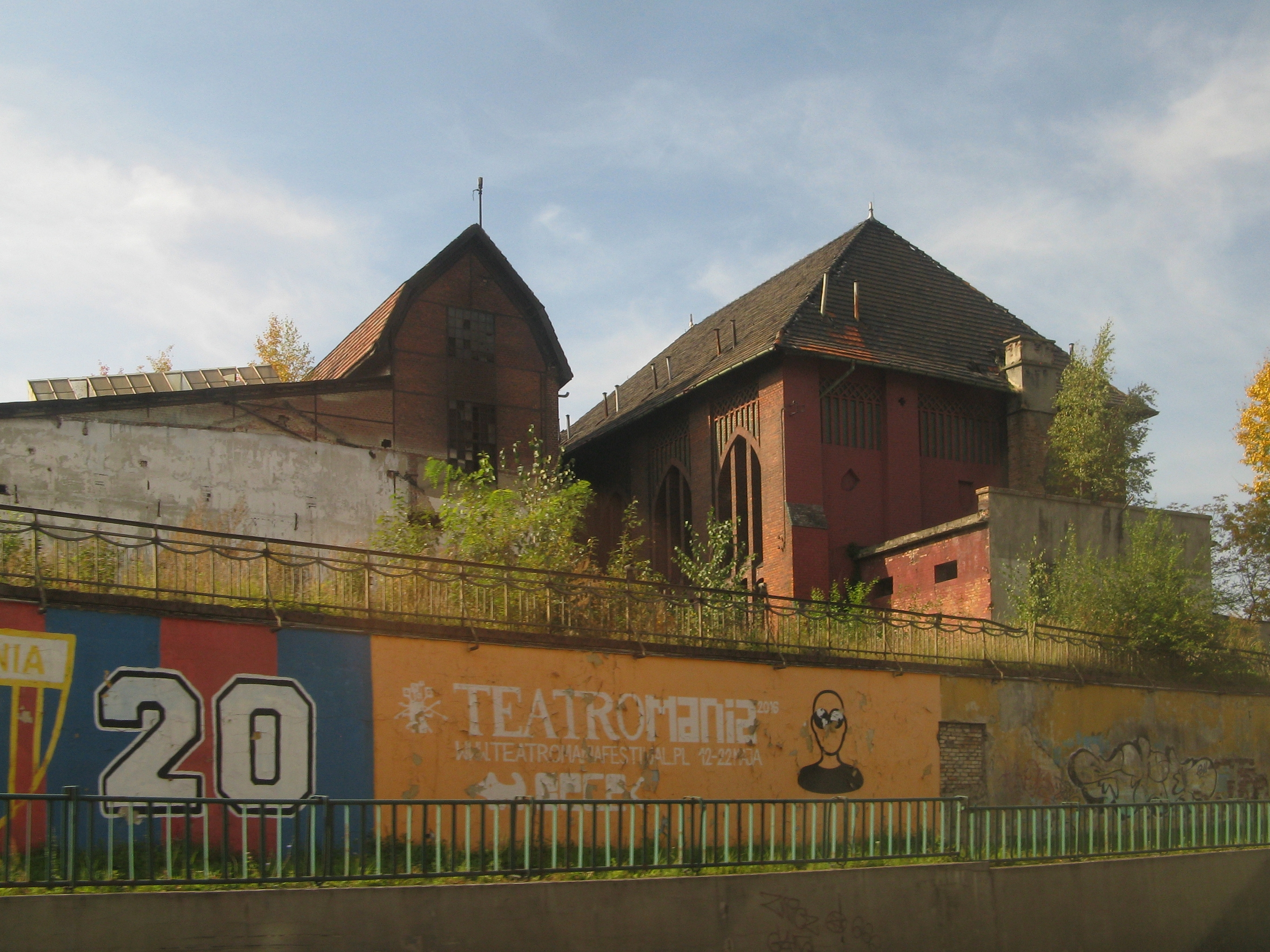 Zabudowania kopalni Rozbark, z prawej maszynownia szybu Bończyk, pod nimi mur oporowy.